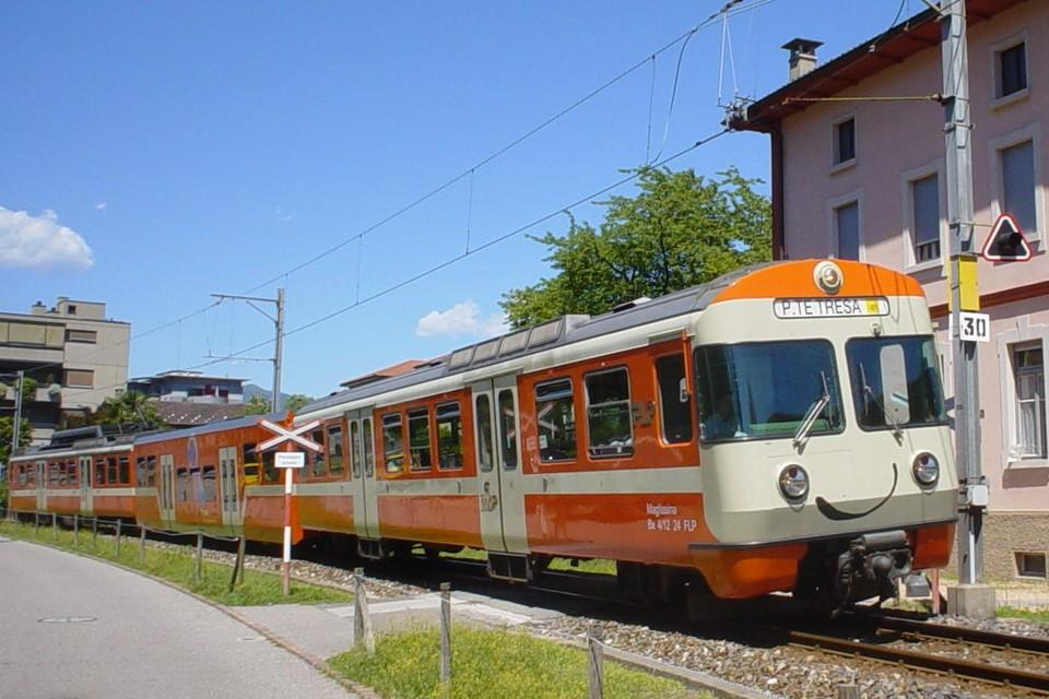 Triebzug Be 4/12 24 der Lugano–Ponte Tresa-Bahn (FLP) im Sommer 2003 in Agno.